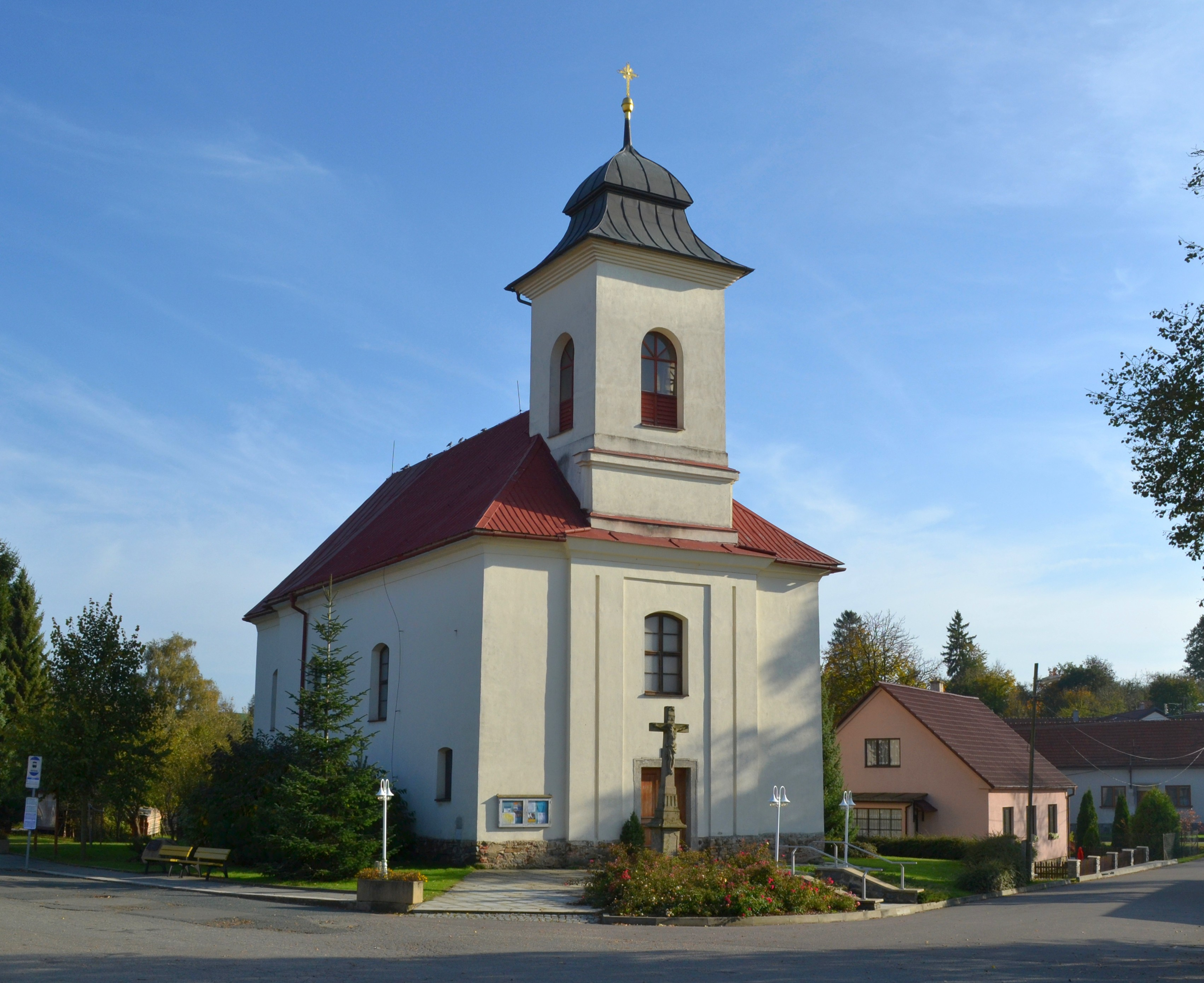 Křoví - kostel svatého Petra a Pavla